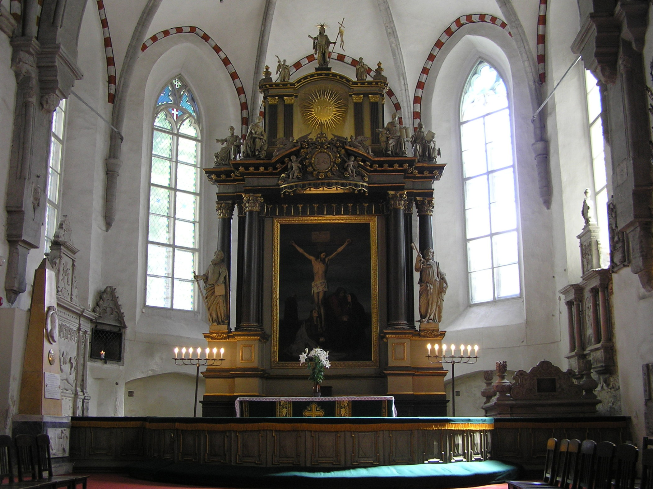 Tallinna toomkiriku altar